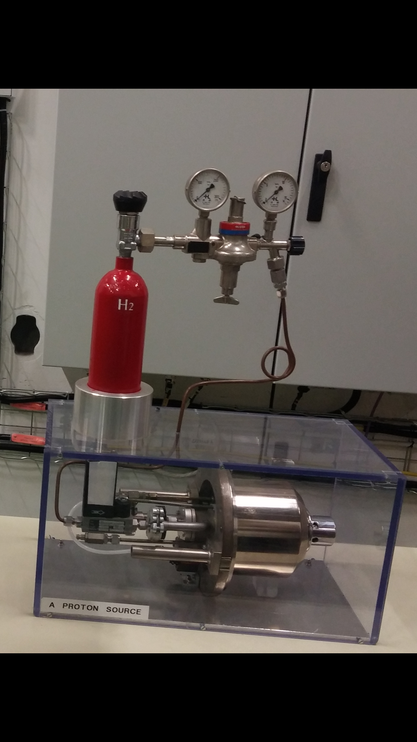 בקבוק גז המימן המשמש כמקור הפרוטונים שנמצא בתחילת המאיץ